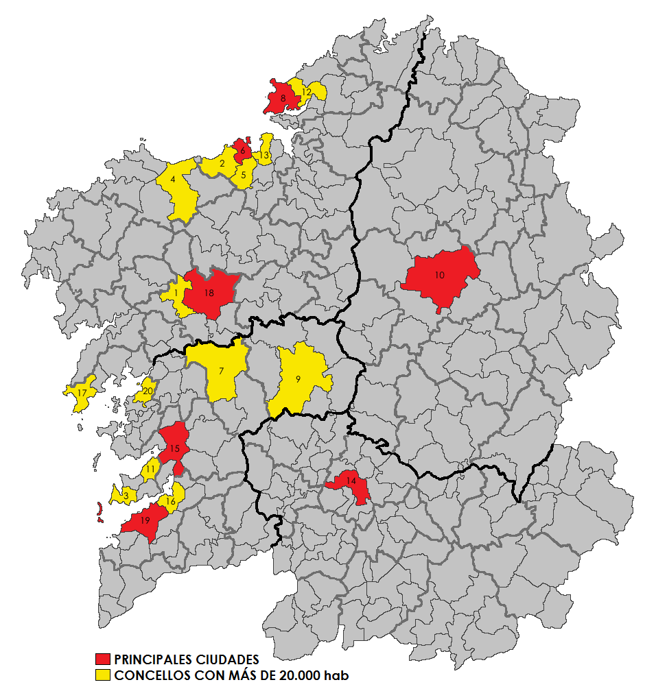 Mapa coas principais cidades e concellos máis poboados de Galiza.